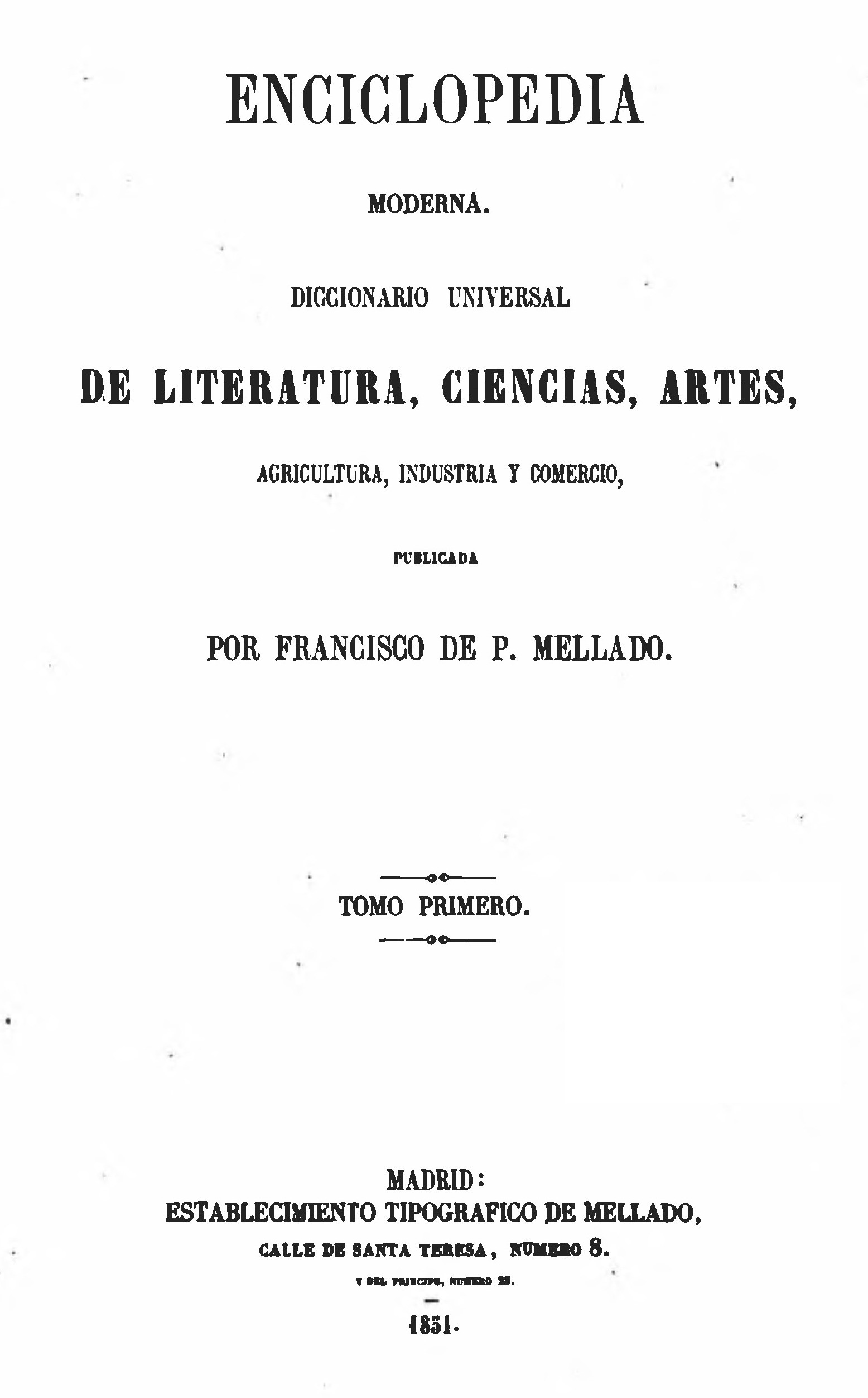 Enciclopedia moderna: diccionario universal de literatura, ciencias, artes, agricultura, industria y comercio, Volumen 1 Establecimiento Tipográfico de Mellado, 1851